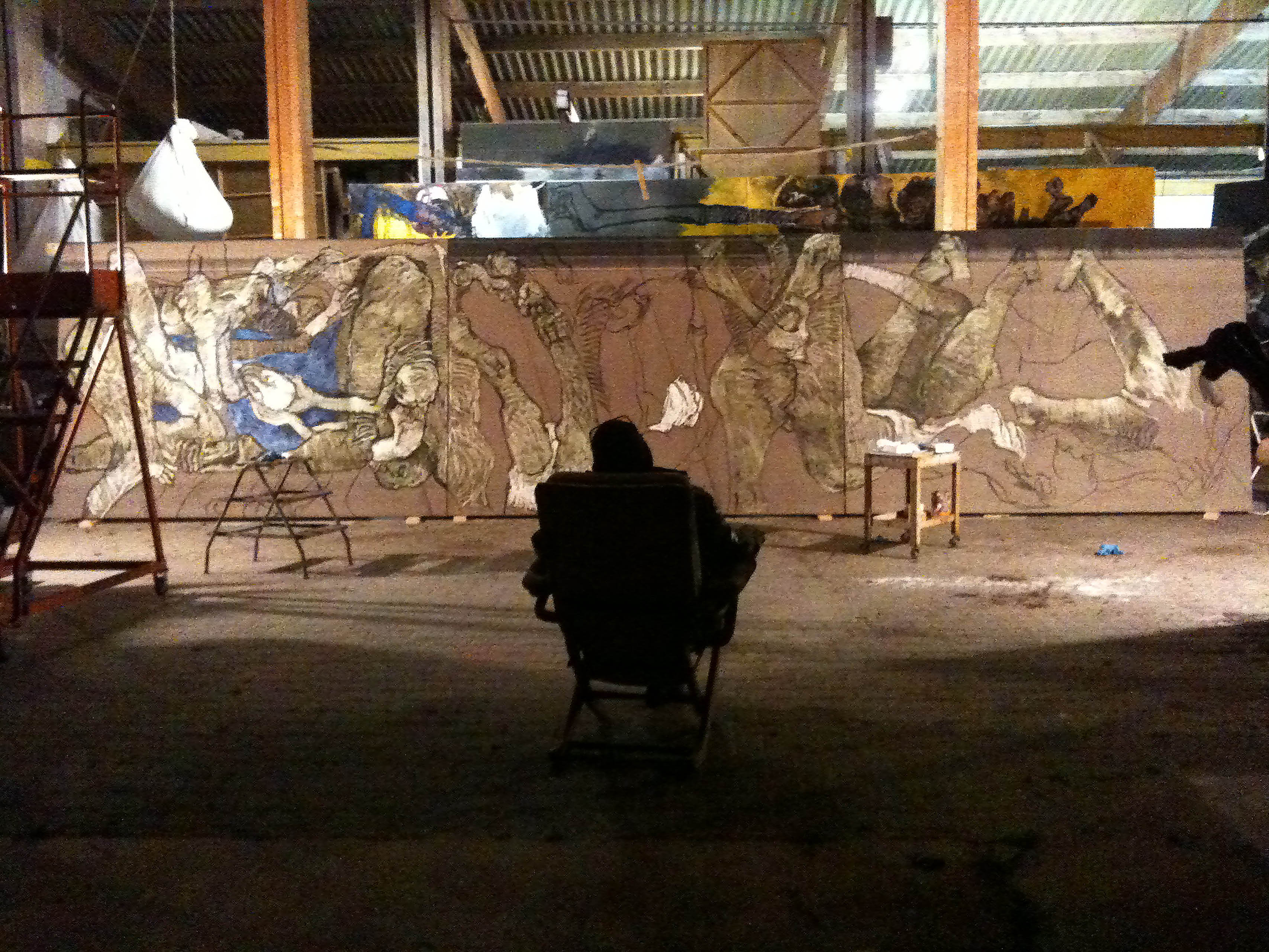 Vu d'atelier...